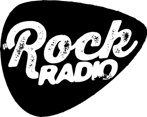 Rock Radio